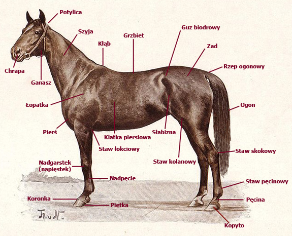 Opis budowy konia na przykładzie ryciny oraz książki "Koń..." Tima Hawcrofta, Warszawa 1996